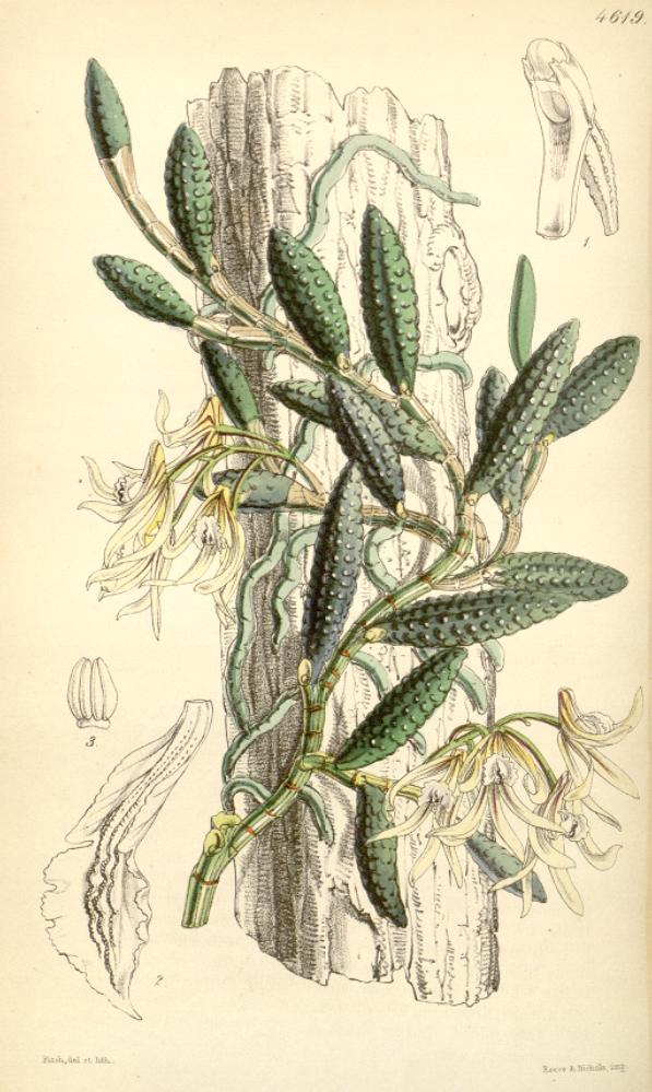 Illustration of Dockrillia cucumerina (Orig. Dendrobium cucumerinum)